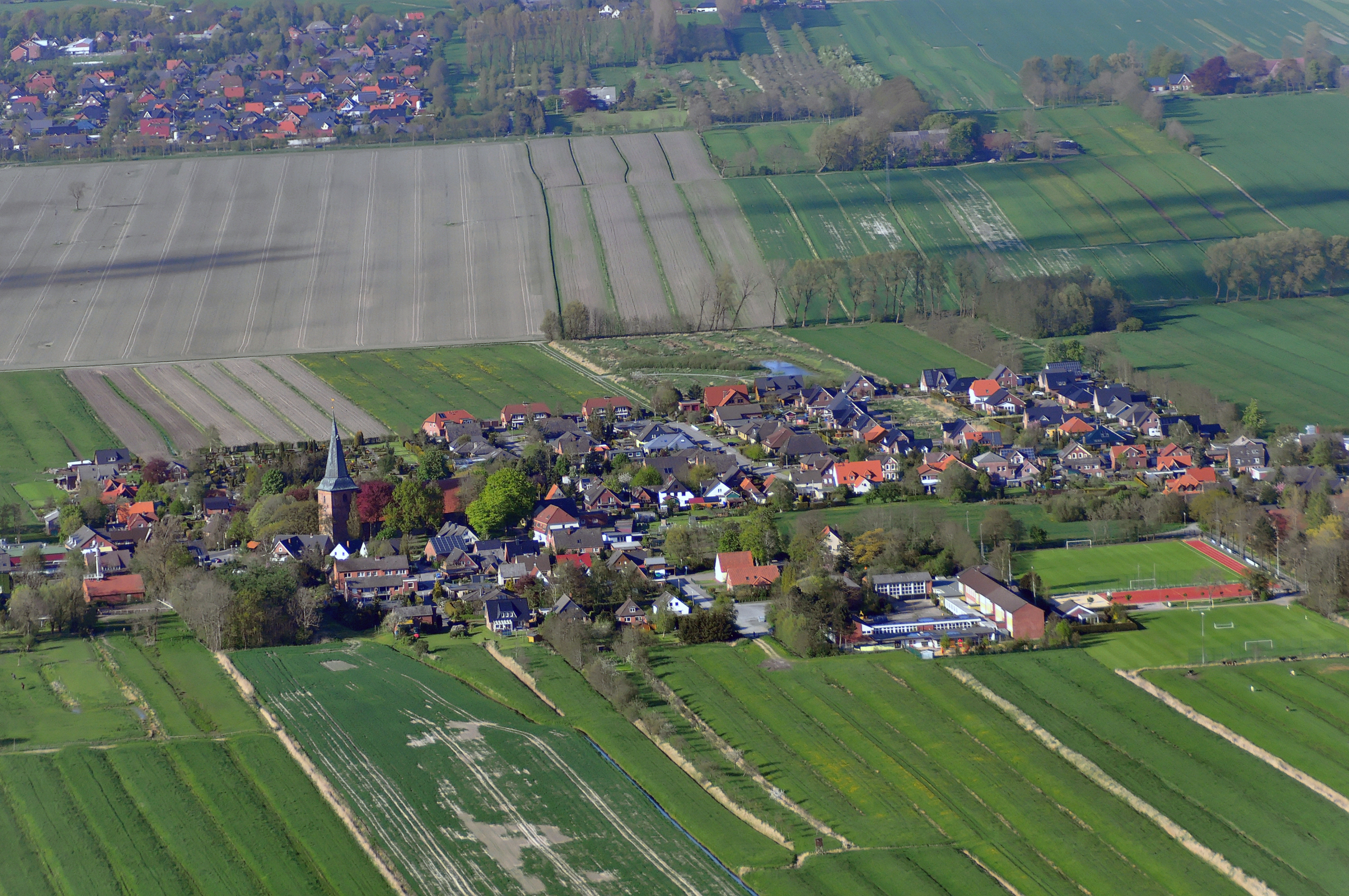 Luftbilder von der Nordseeküste 2012-05